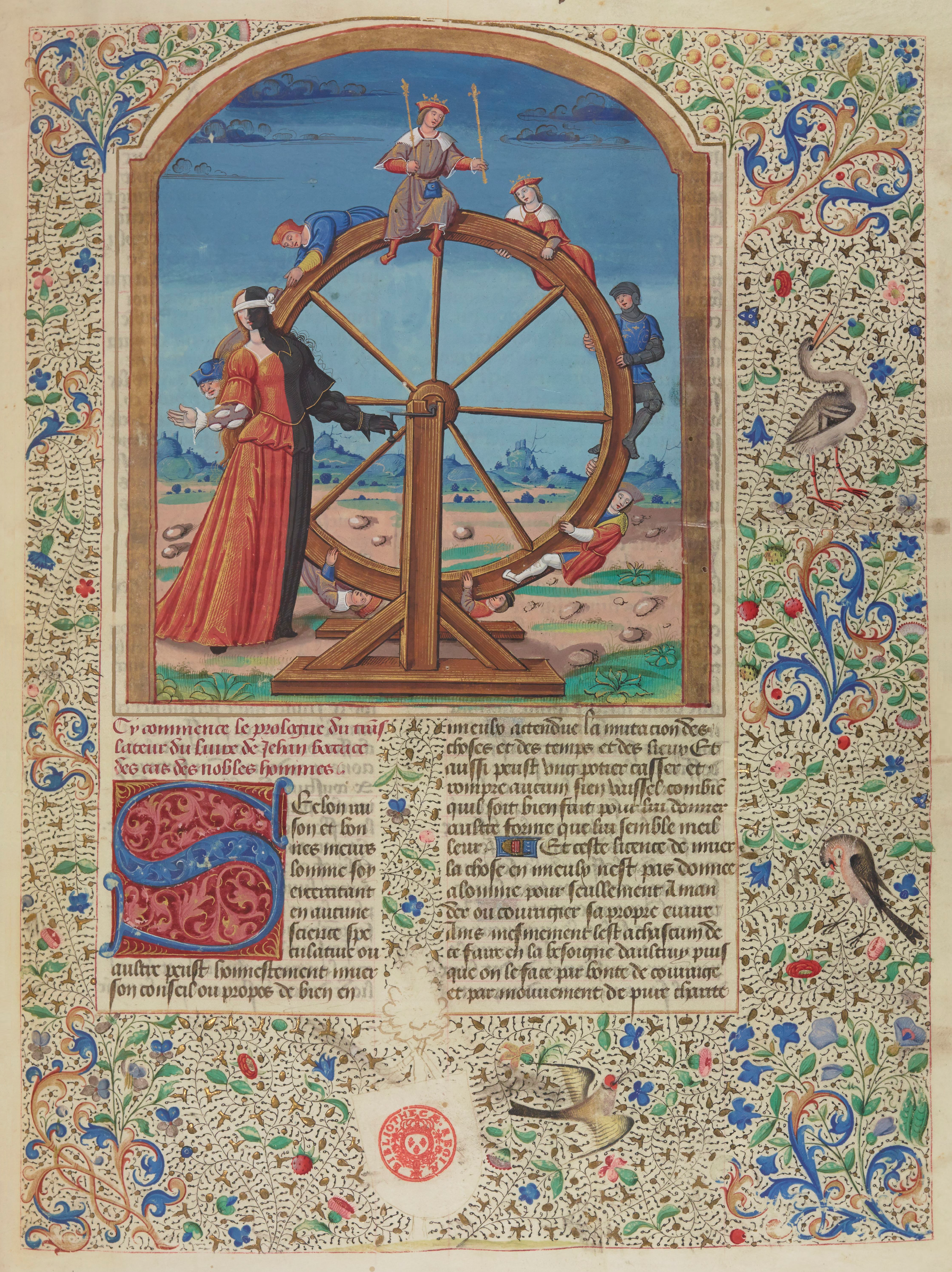 Fortune aveugle tourne sa roue dans le Livres des cas des nobles hommes et femmes, Étienne Colaud, vers 1530, France.